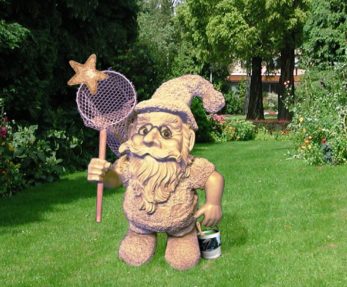 ZEO (Zamehof-Esperanto-Objekto) ĝarden-nanigita Zazao, provanta kapti stelon per papilireto, celante ĝin farbi verde - kaj tiel, iĝi duobla ZEO.